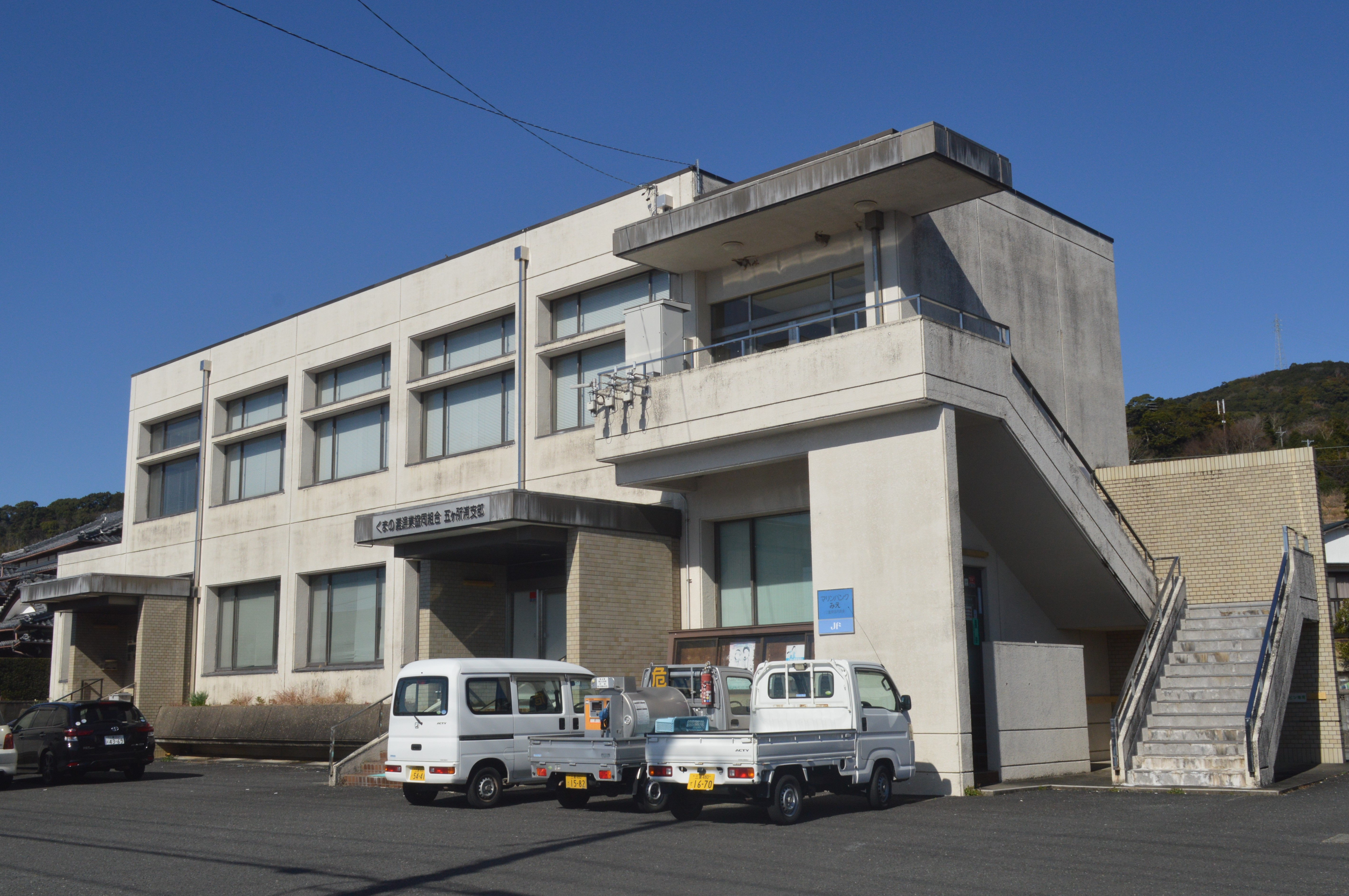 三重県度会郡南伊勢町五ヶ所浦にある熊野灘漁業協同組合五ヶ所浦支店。